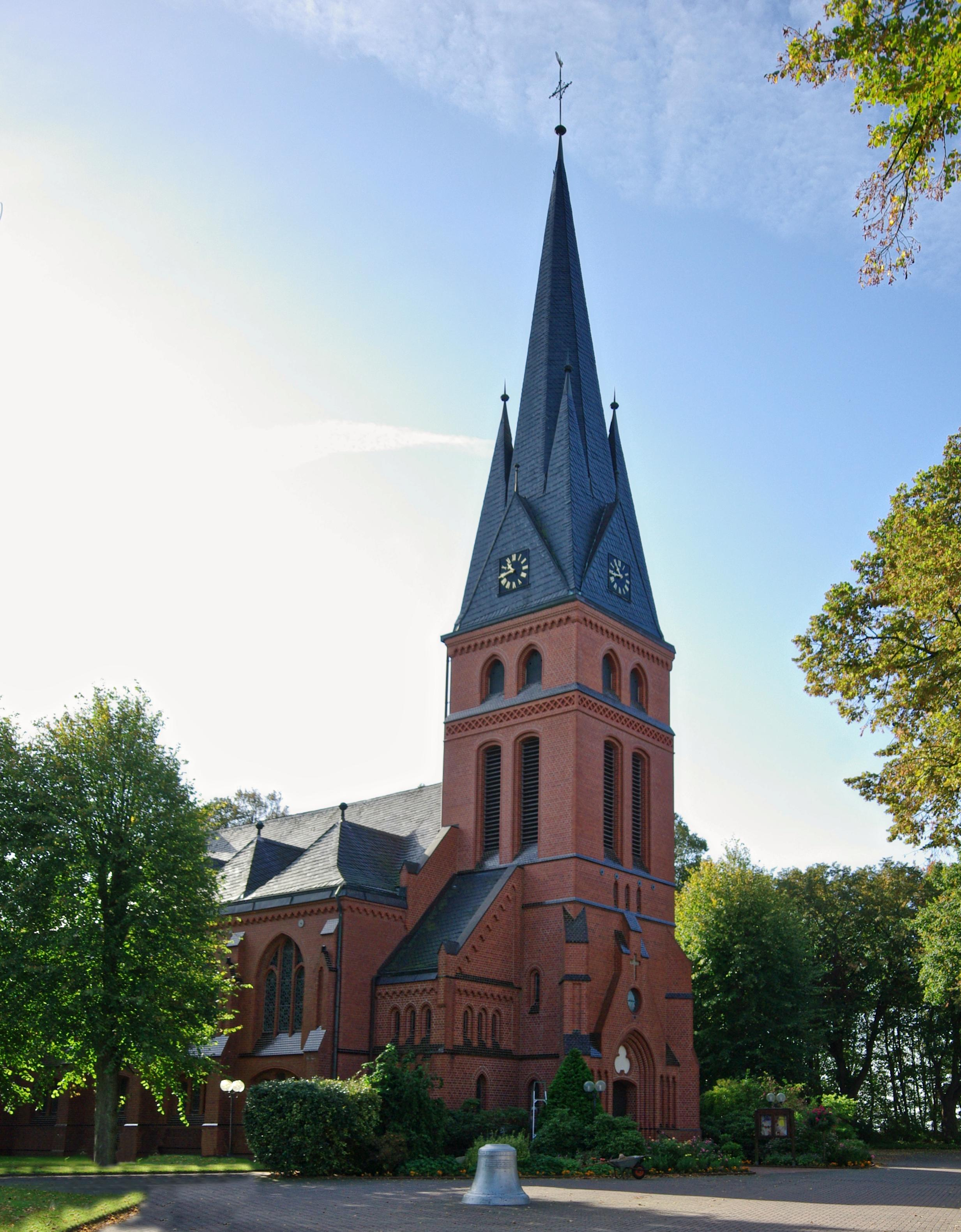 Christuskirche Hemmoor